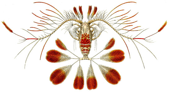 Calanus pavo (Dana) = Calocalanus pavo (Dana, 1852), male